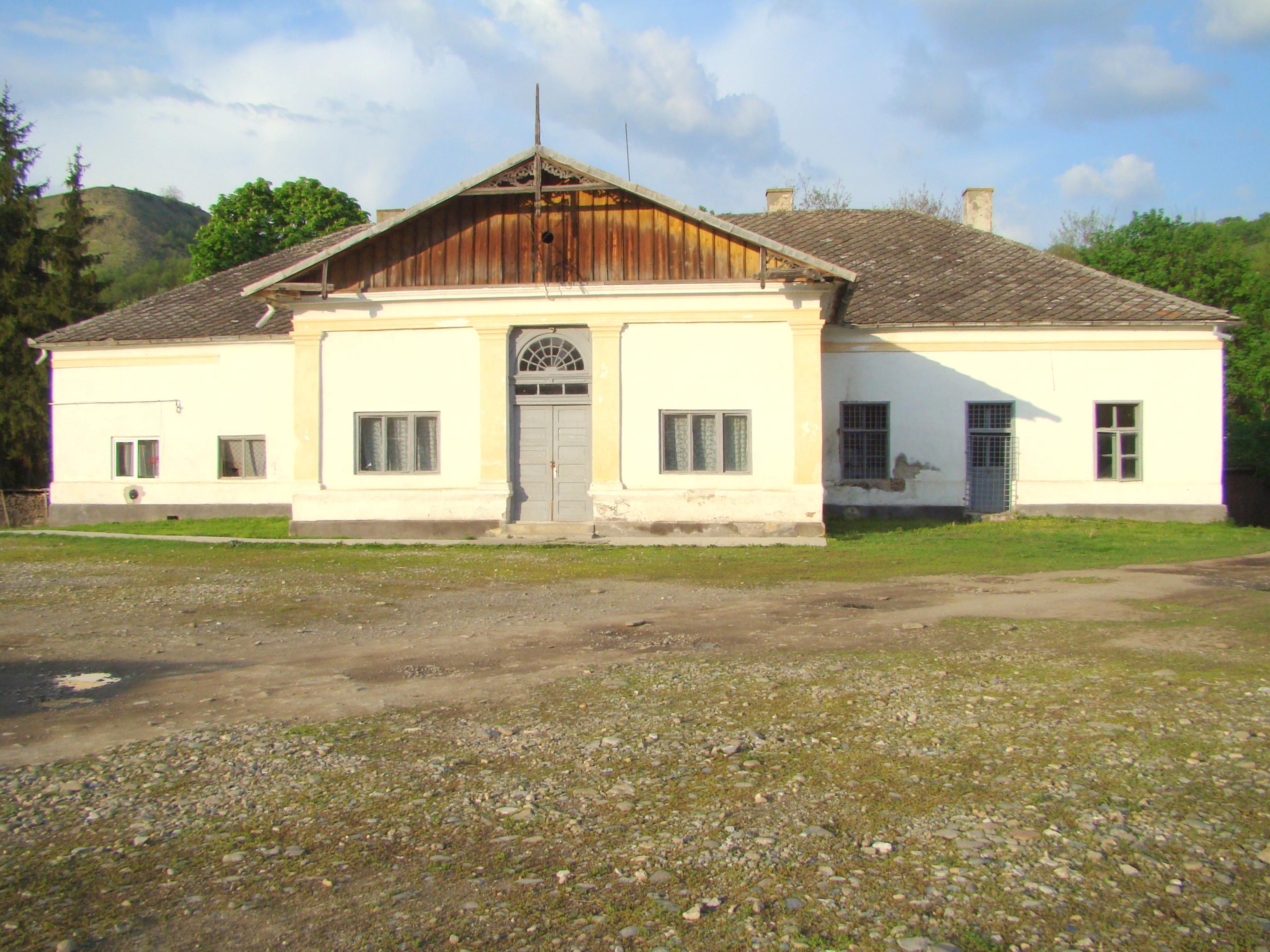 Castelul Haller, azi Primăria comunei Matei, sat Matei; comuna Matei